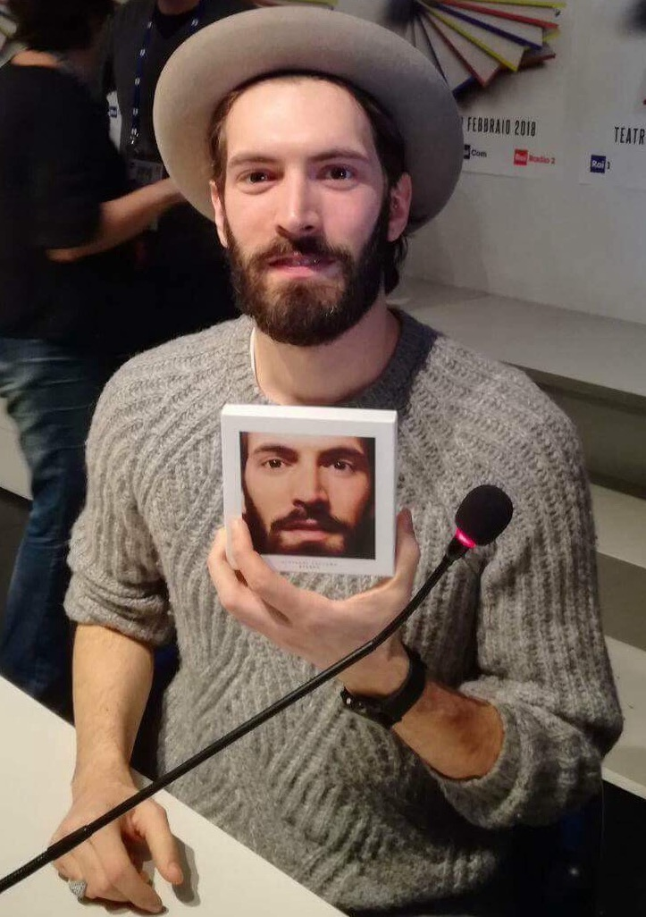 Giavanni Caccamo al Festival d i Sanremo 2018